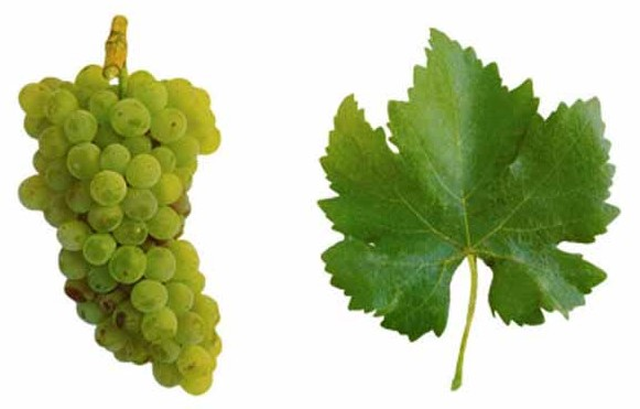 Traube und Blatt der Weißweinsorte 'Siria'